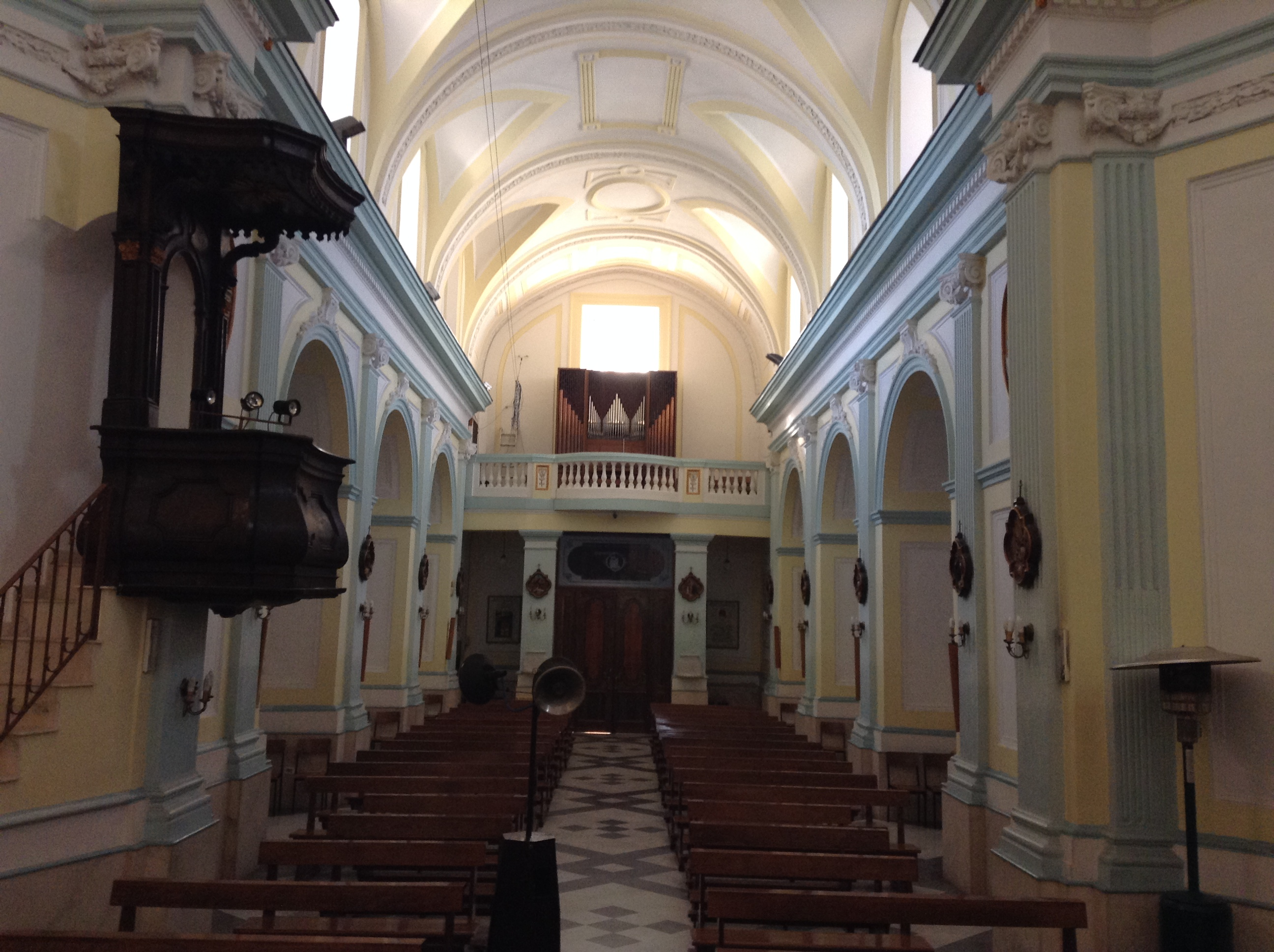 Interno della Chiesa Matrice di San Giovanni Battista in Striano (Na)